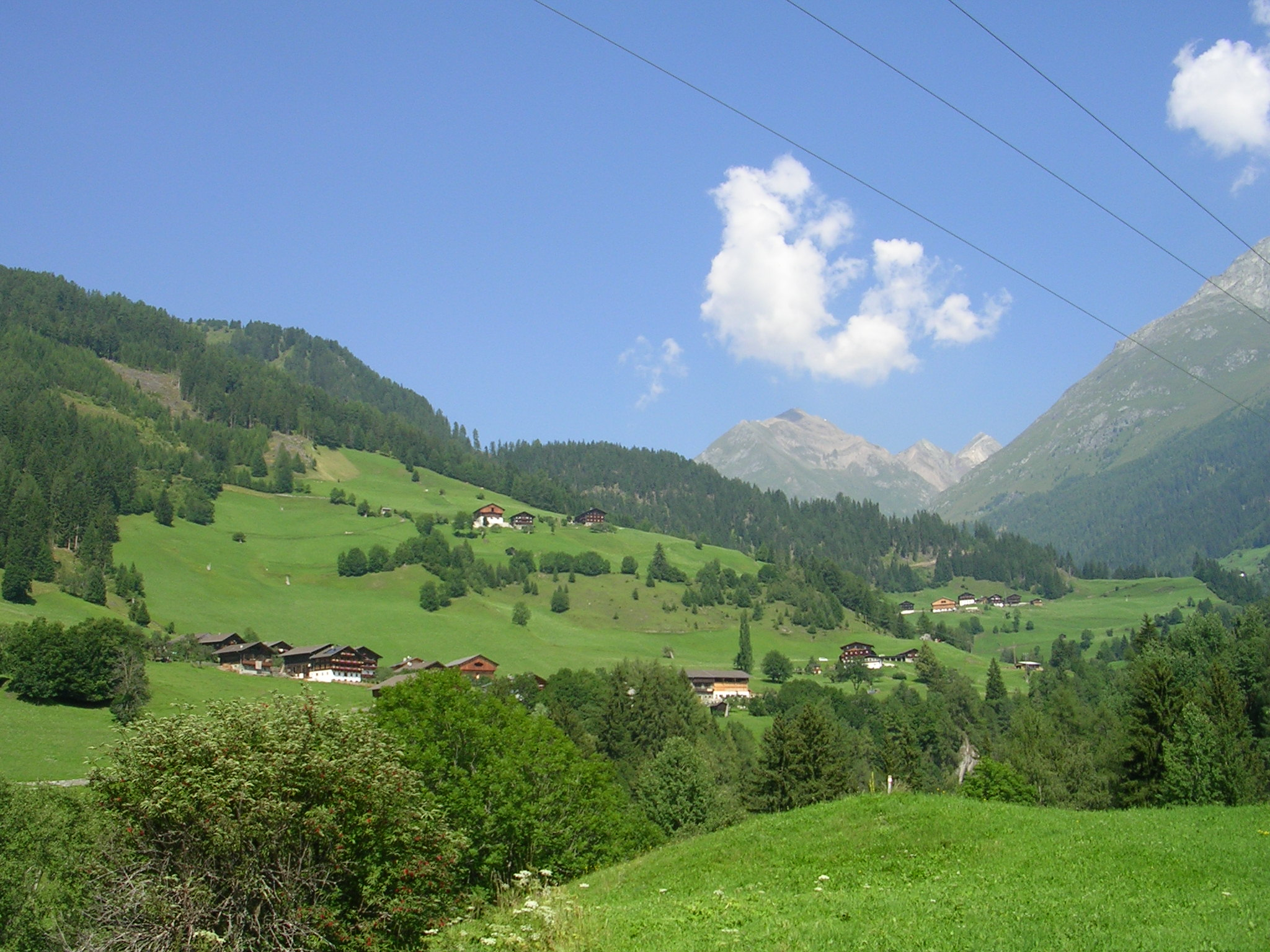 Die Fraktion Welzelach (Gemeinde Virgen), gesehen von Süden vom Eingang des Mullitztals